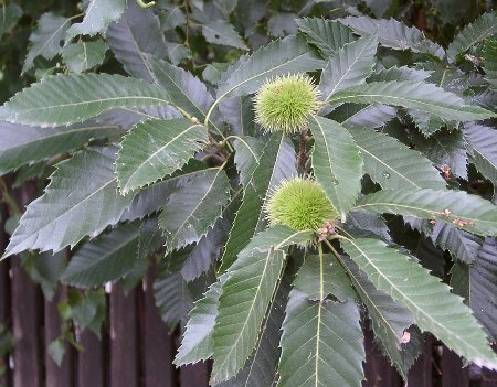 Esskastanie